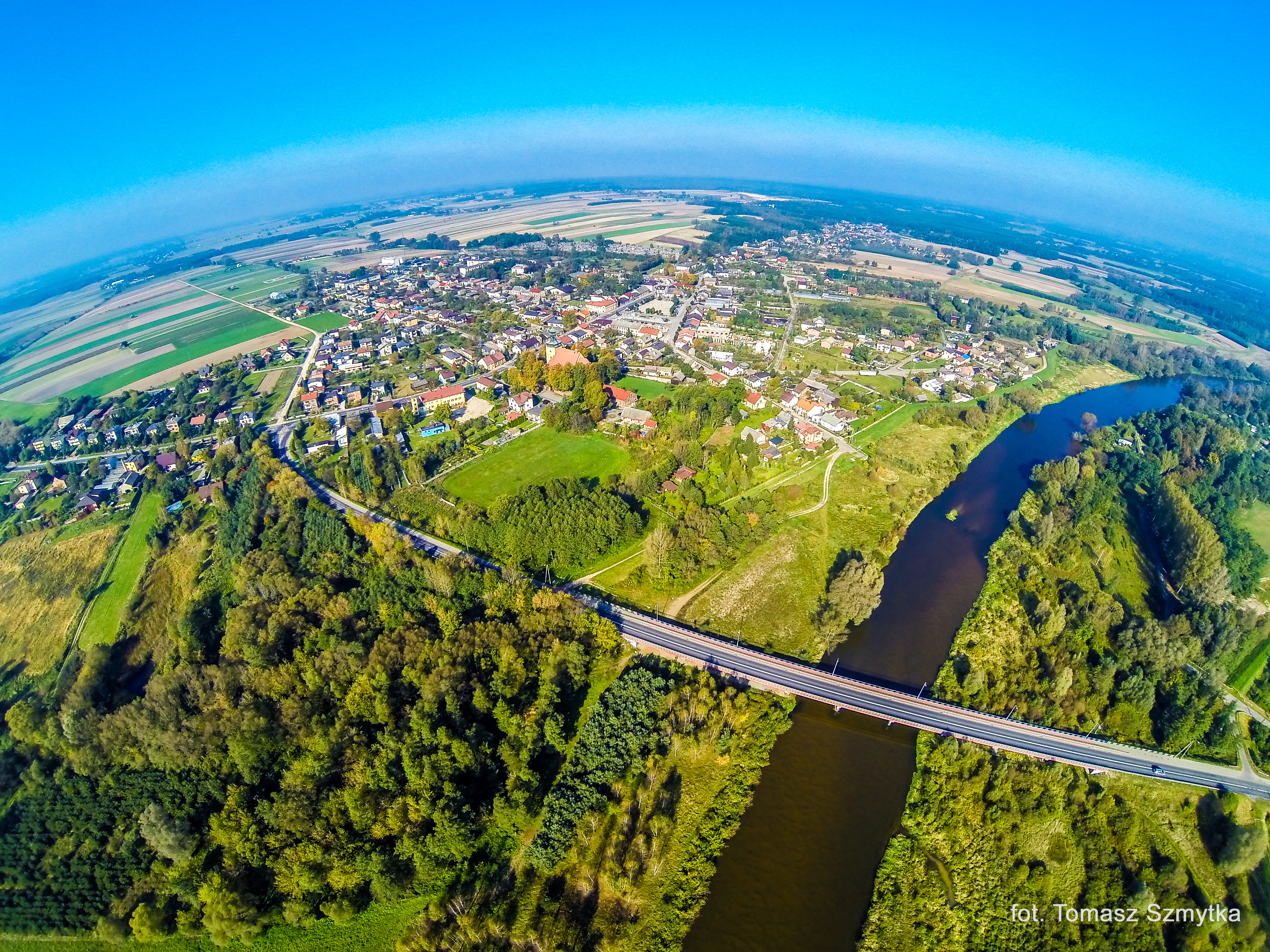 Burzenin z wysokości 135 m nad ziemią